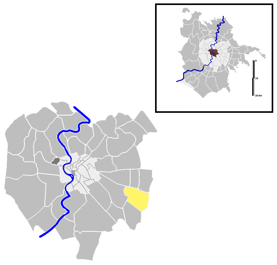 Don Bosco